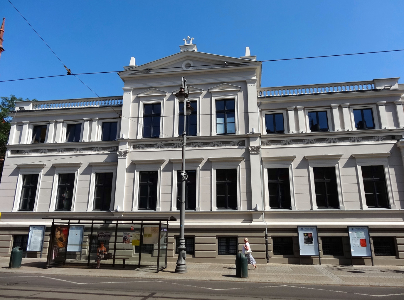 Budynek Akademii Muzycznej przy ul. Gdańskiej 20 w Bydgoszczy, dawne Kasyno Cywilne (zbud. 1887), Pomorski Dom Sztuki, scena Opery Nova